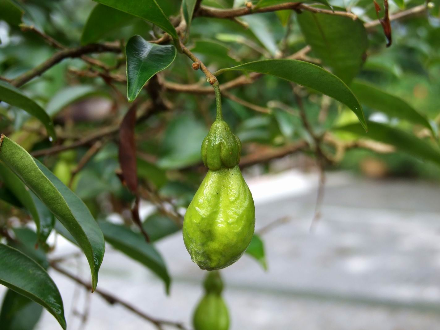 中文（香港）: 牙香樹果實